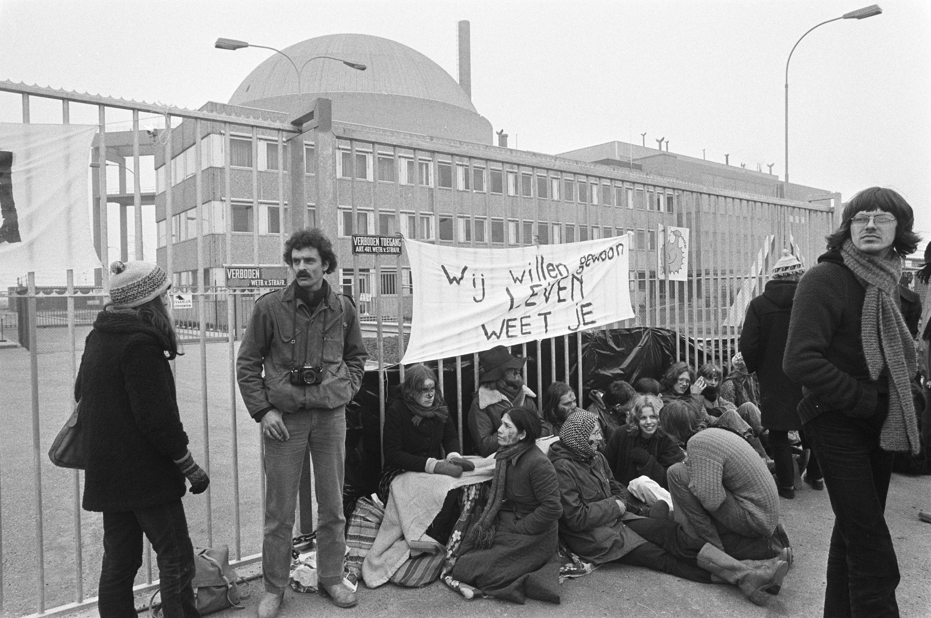 Demonstranten blockieren die Einfahrt zum Kernkraftwerk Borssele.